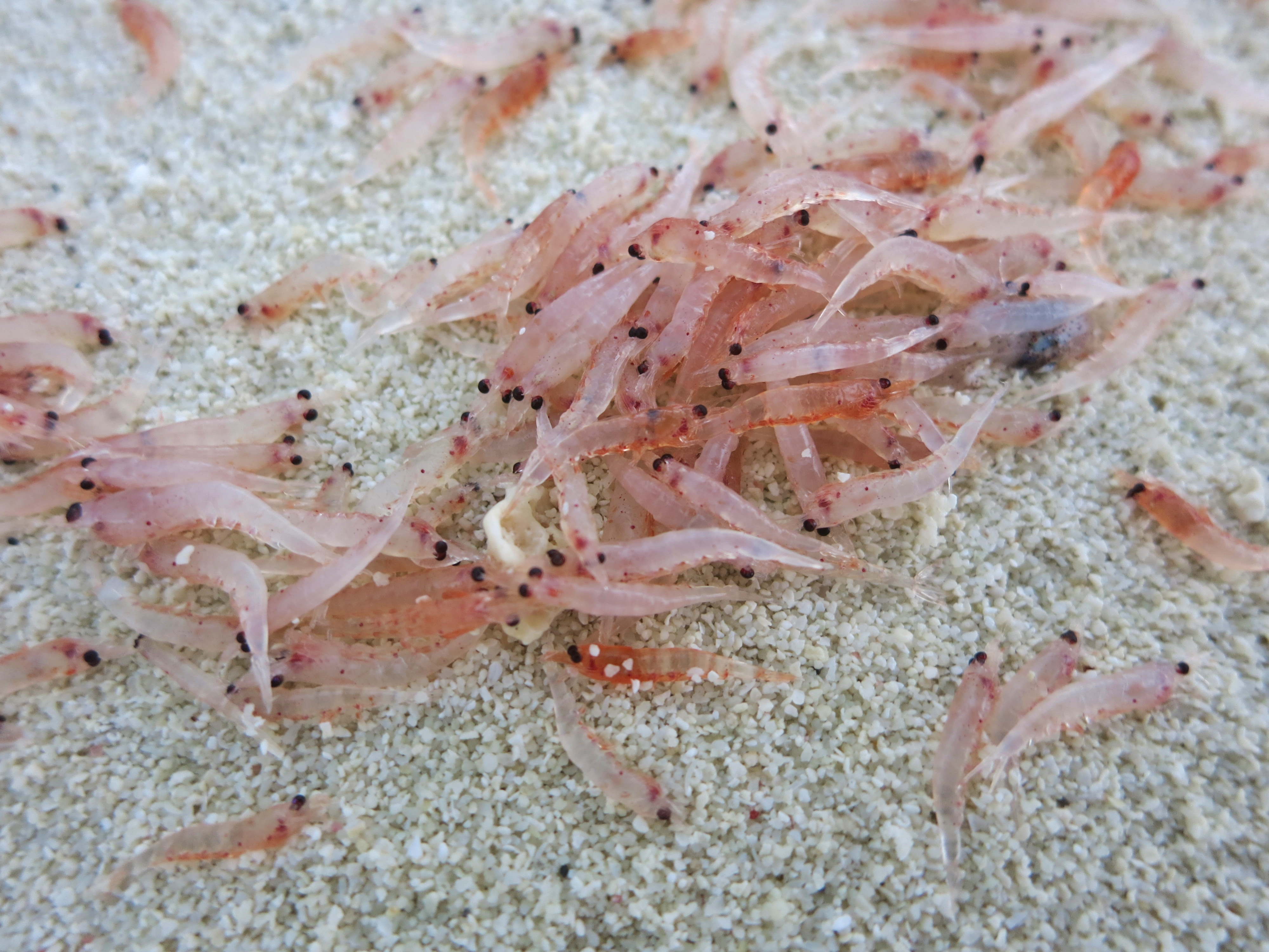 Du krill déposé sur une plage aux Maldives (atoll de Baa).